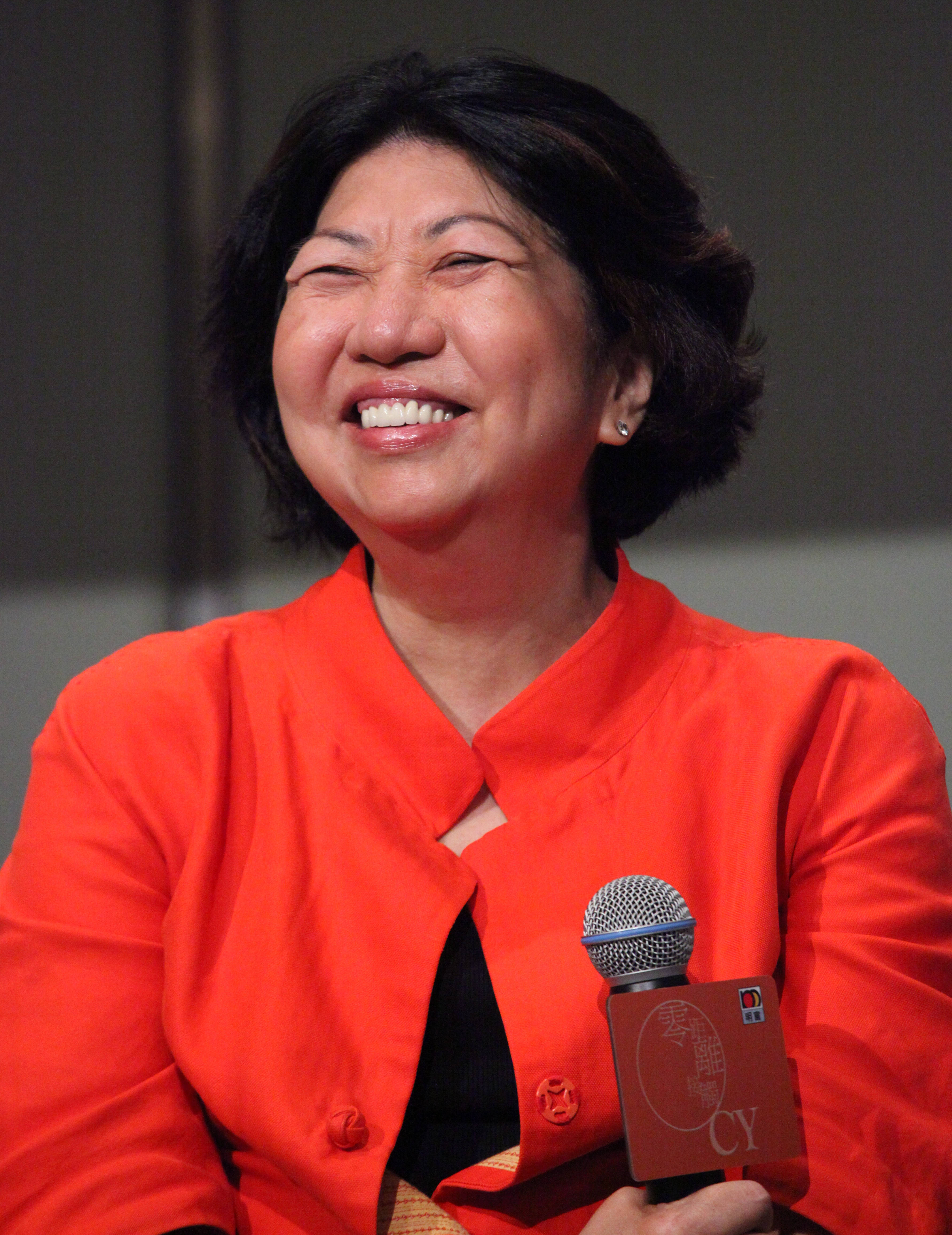 紀文鳳